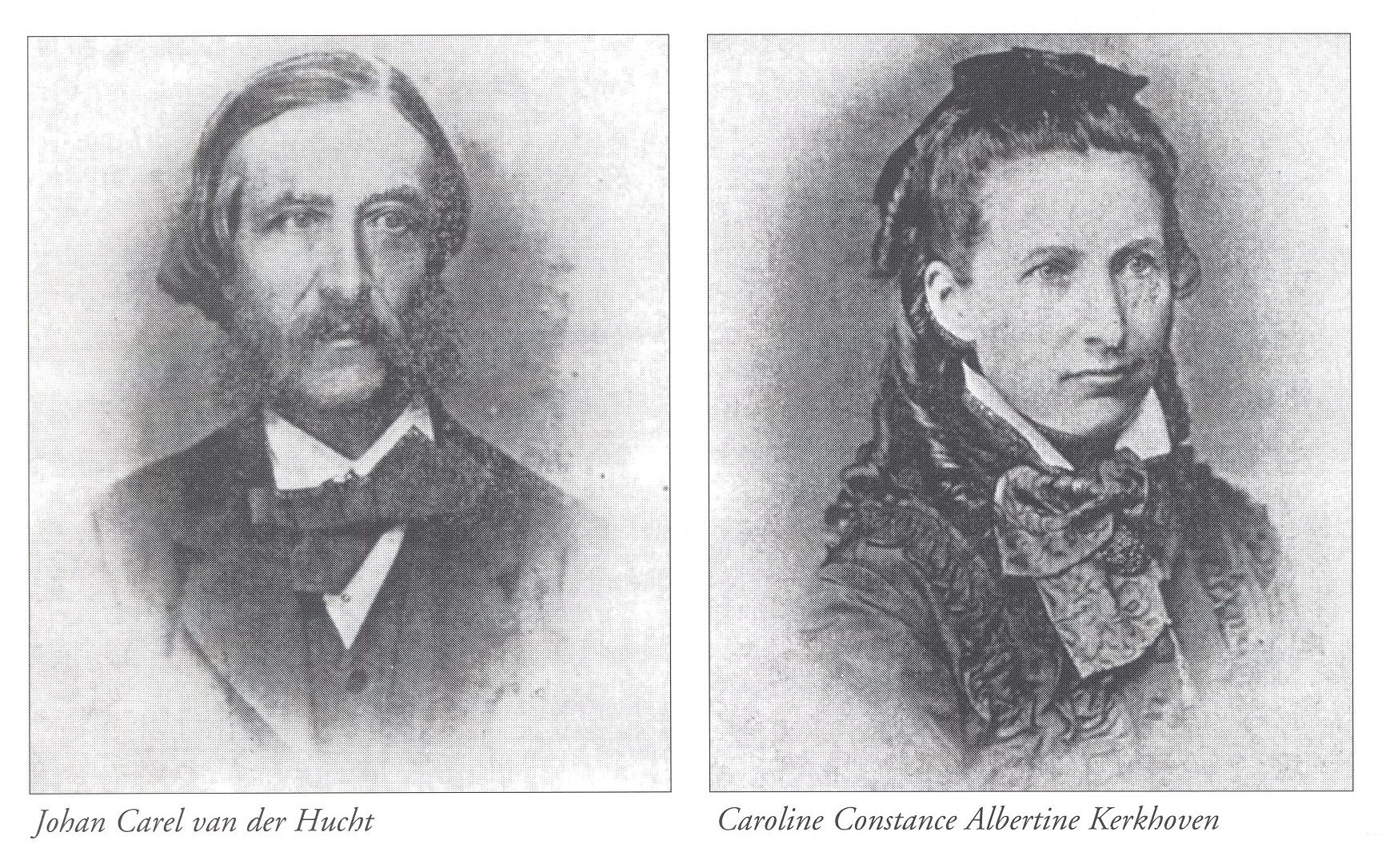 Uit: De Familie Van der Hucht, ISBN 90 6455 342 4 page 44